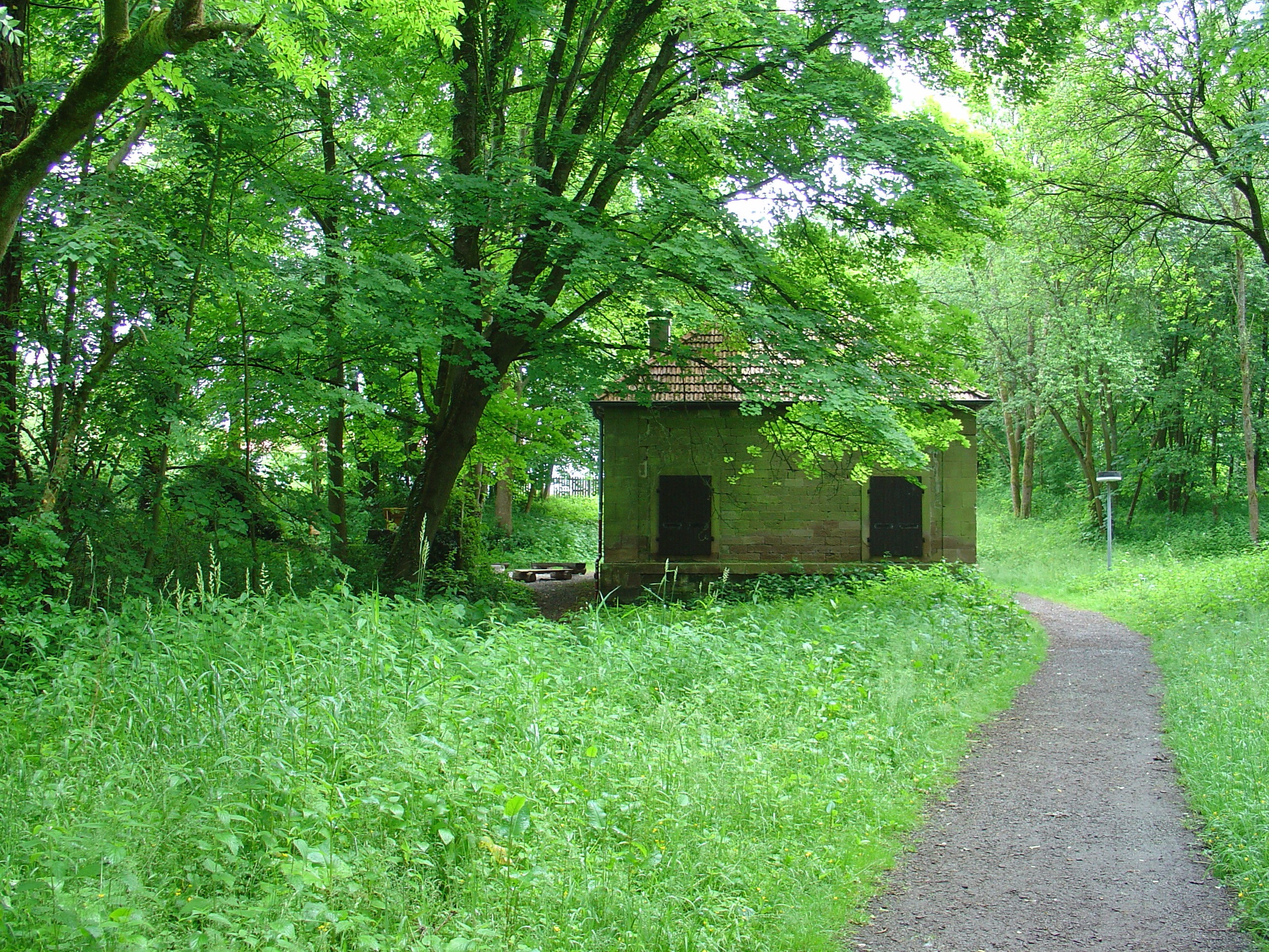 Ölmühle des Klosters Hardehausen Inschrift am Türsturz: "1798"